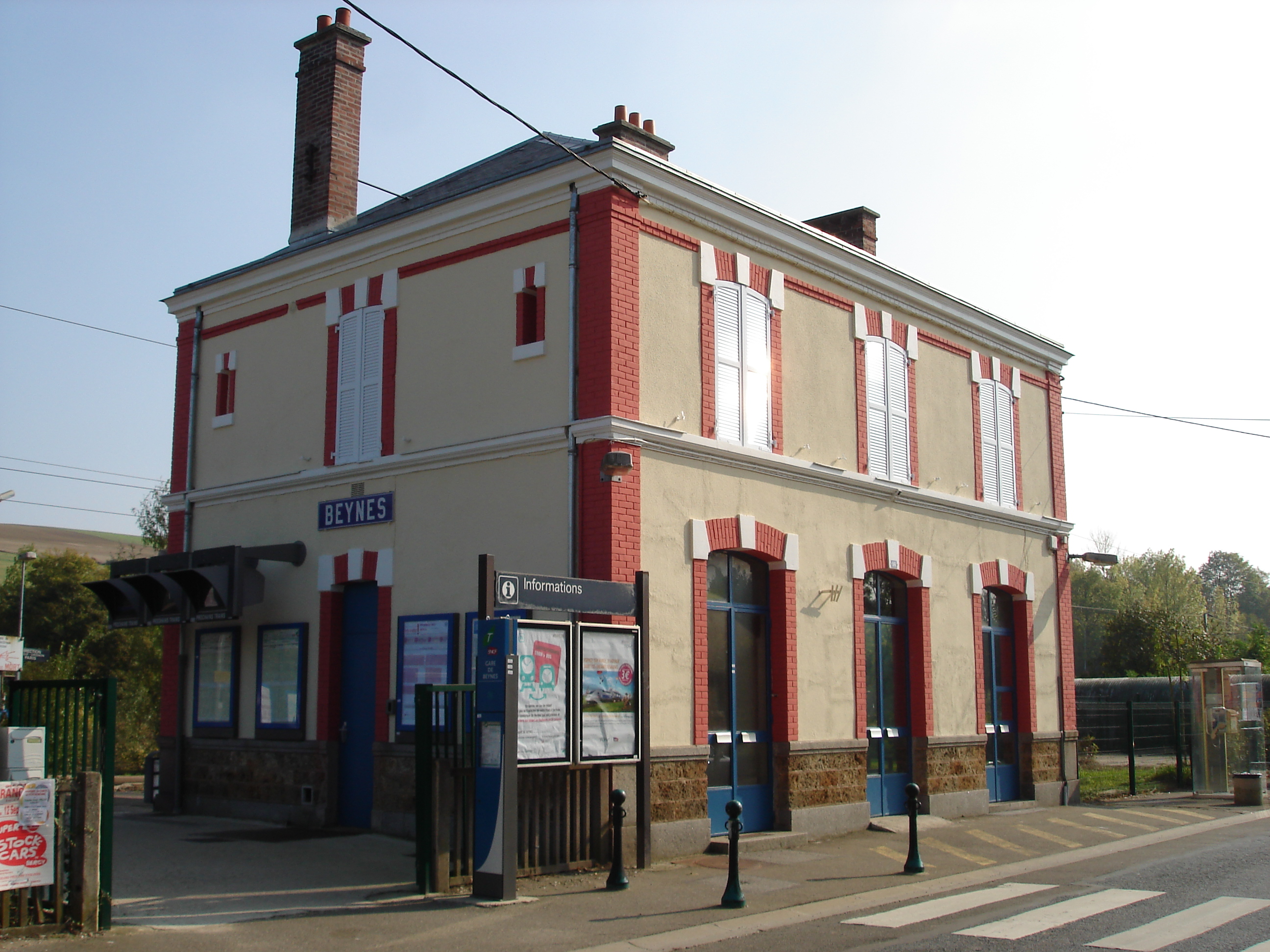 Gare de Beynes (78) : Le bâtiment voyageurs.